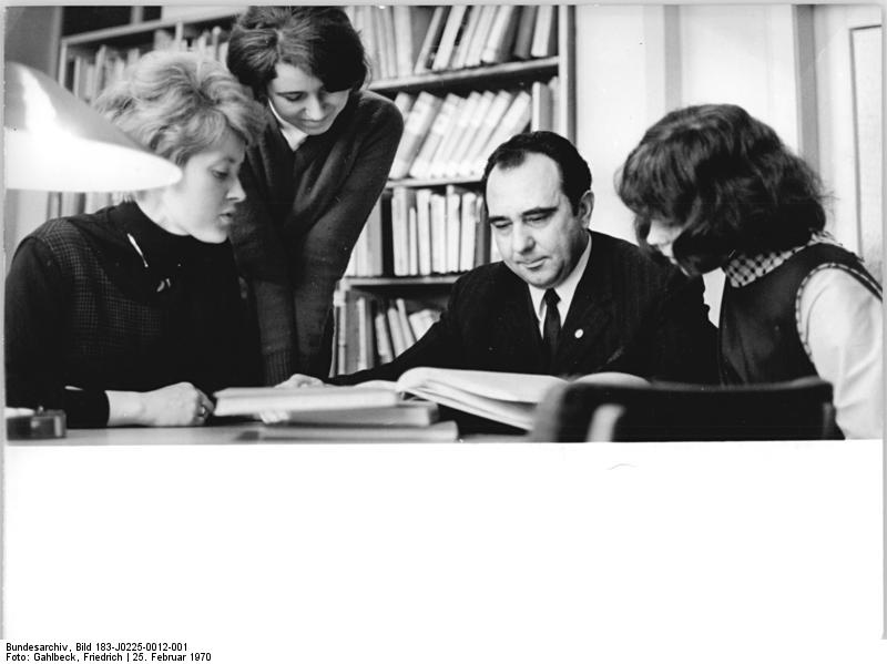 Helmut Rötzsch mit Auszubildenden Zentralbild Gahlbeck 25-2-70 Leipzig: Generaldirektor der Deutschen Bücherei kandidiert für Stadtverordnetenversammlung- Zu den Kandidaten für die Leipziger Stadtverordnetenversammlung gehört auch der Generaldirektor der Deutschen Bücherei, Dr. Helmut Rötzsch (2.v.r.). Der namhafte Bibliothekswissenschaftler wirkte bereits in zwei zurückliegenden Legislaturperioden als Abgeordneter. Seit mehr als 6 Jahren ist er Vorsitzender der ständigen Kommission Kultur. Im Kreise der Lehrlinge eines Lernaktivs, die von der wissenschaftlichen Bibliothekarin Helma Schaefer (l.) angeleitet werden, informiert sich Dr. Rötzsch über den Leistungsstand des Aktivs.